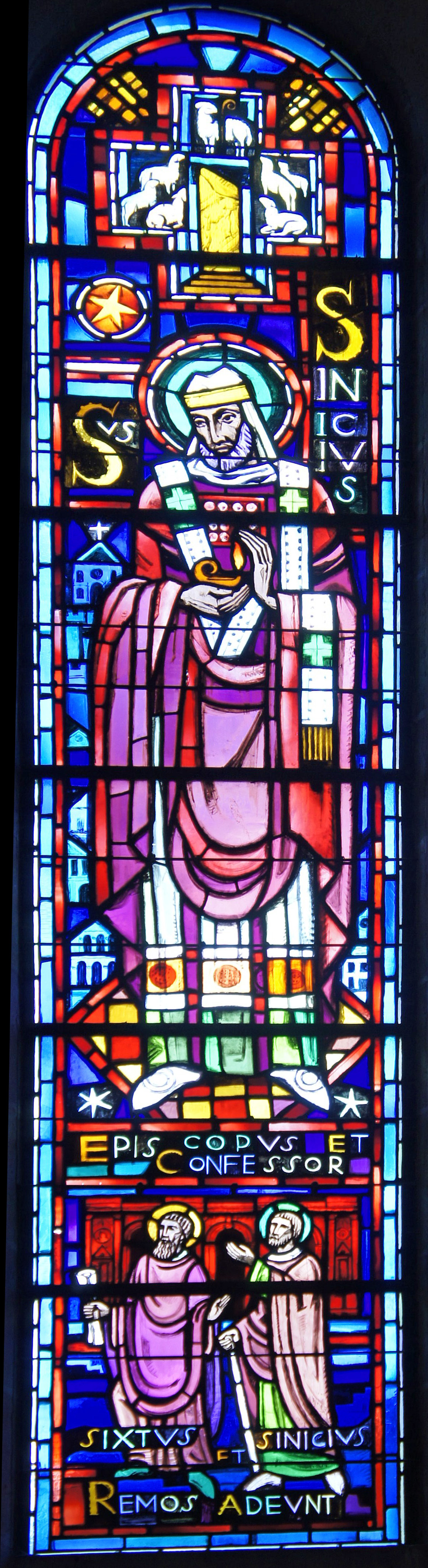 couvent Sainte-Sixte ancien séminaire de Reims. Vitrail de Sinicius de Reims.